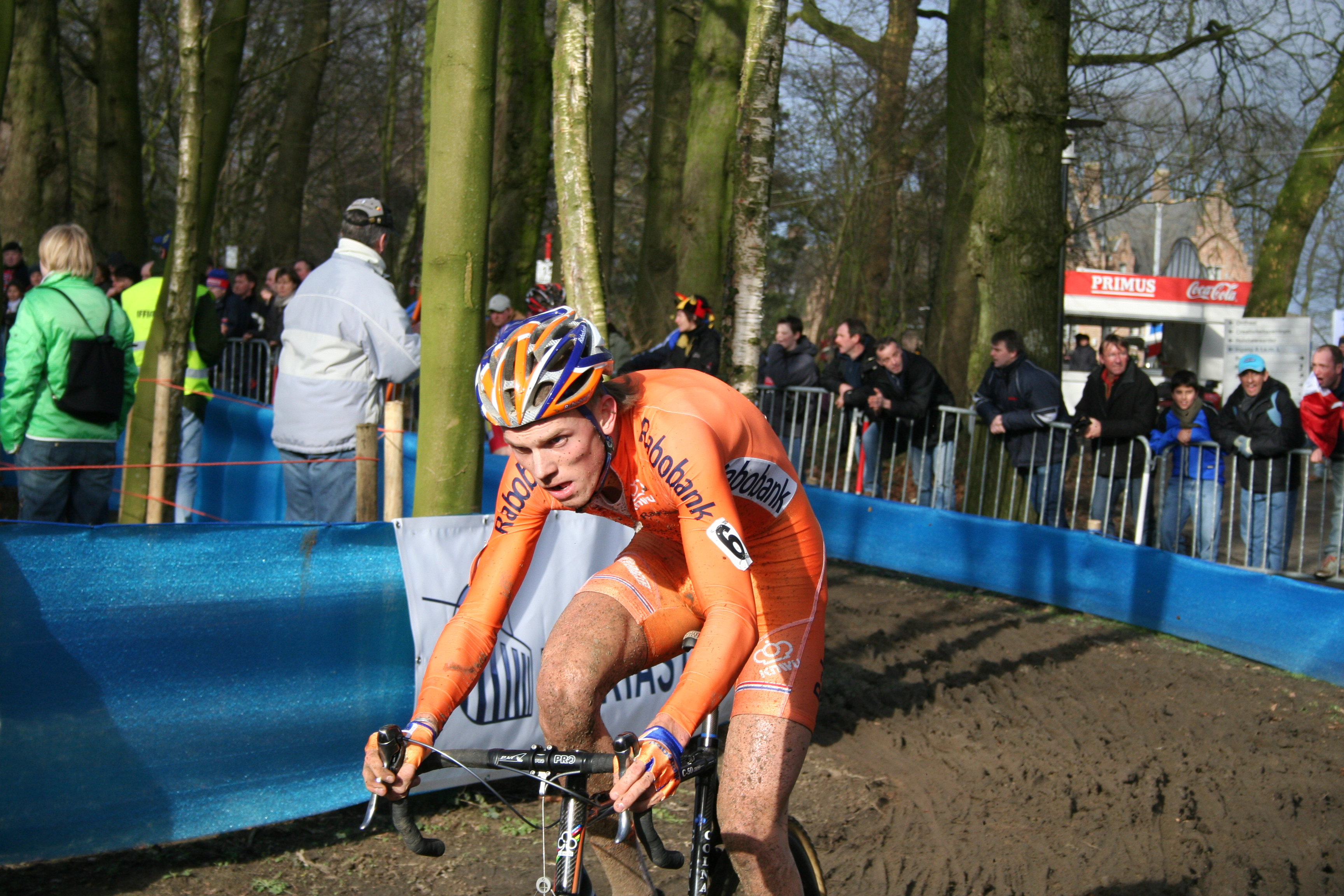 Lars Boom tijdens het WK voor beloften 2007